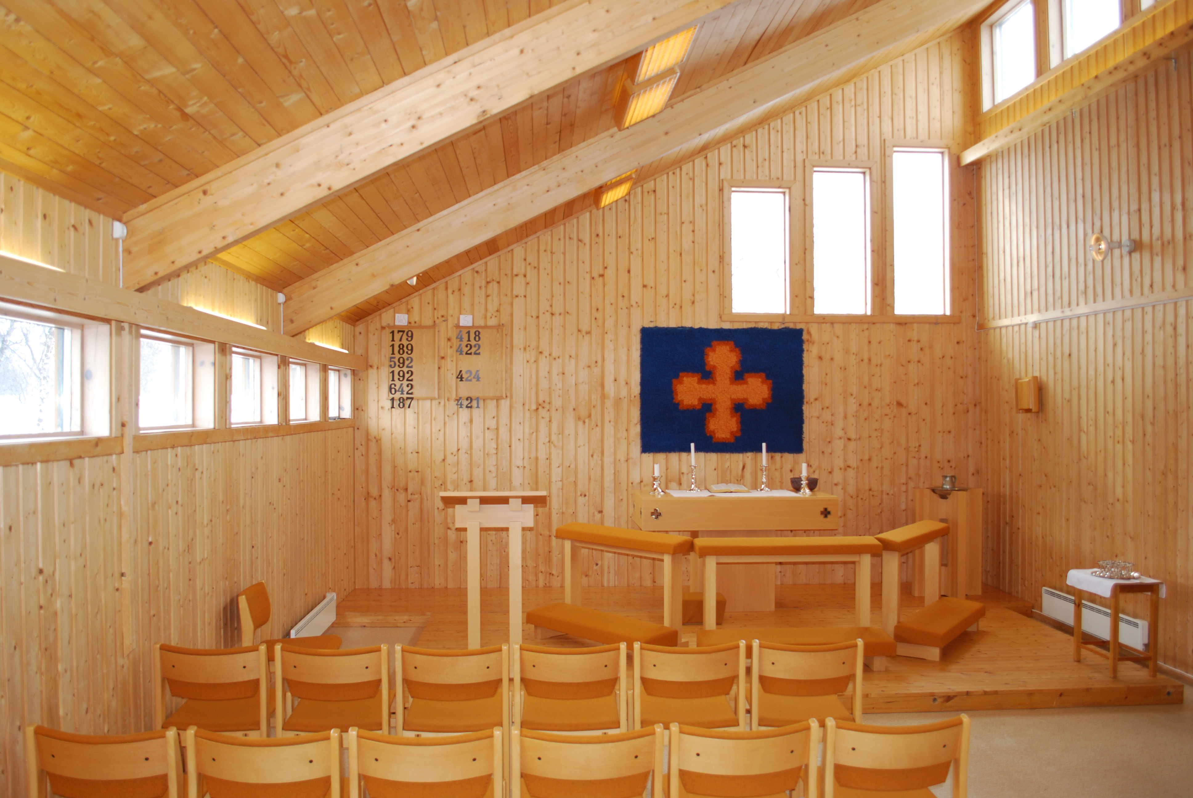 Vestertana kapell, Tana kommune, Finnmark, interiør